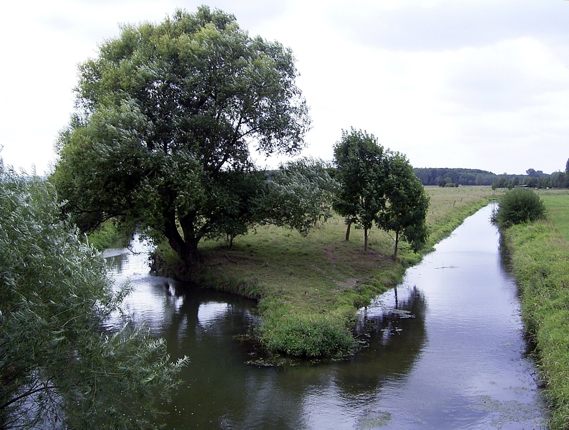 Rodenberger Aue und Sachsenhäger Aue vereinen sich zur Westaue bei Auhagen.